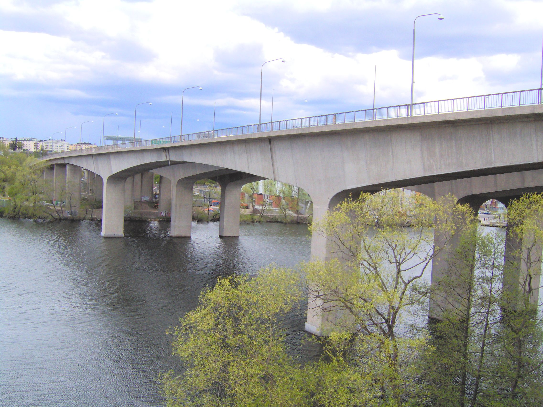 Essingebroarna i Stockholm från Stora Essingen mot Lilla Essingen.